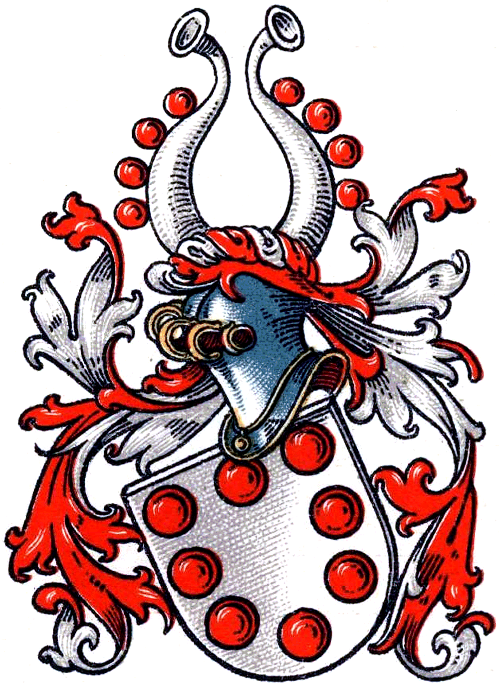 Wappen derer von Stael